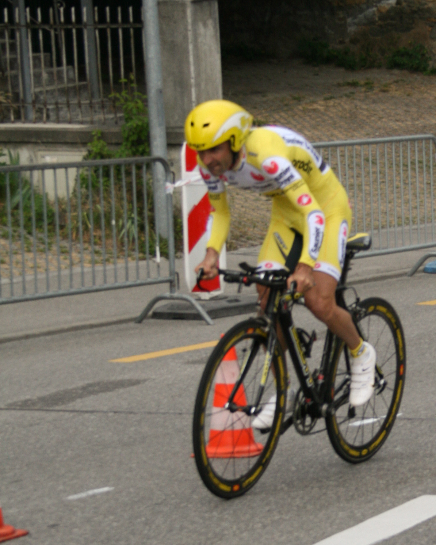 Leonardo Piepoli prologue du Tour de Romandie 2007